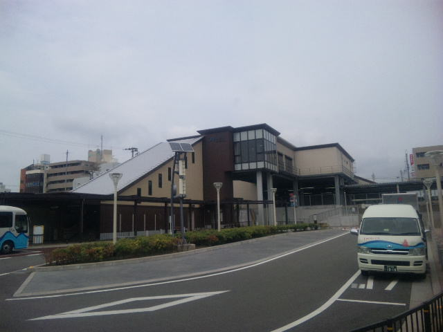 魚住駅南口。右に停車しているのはタコバス。